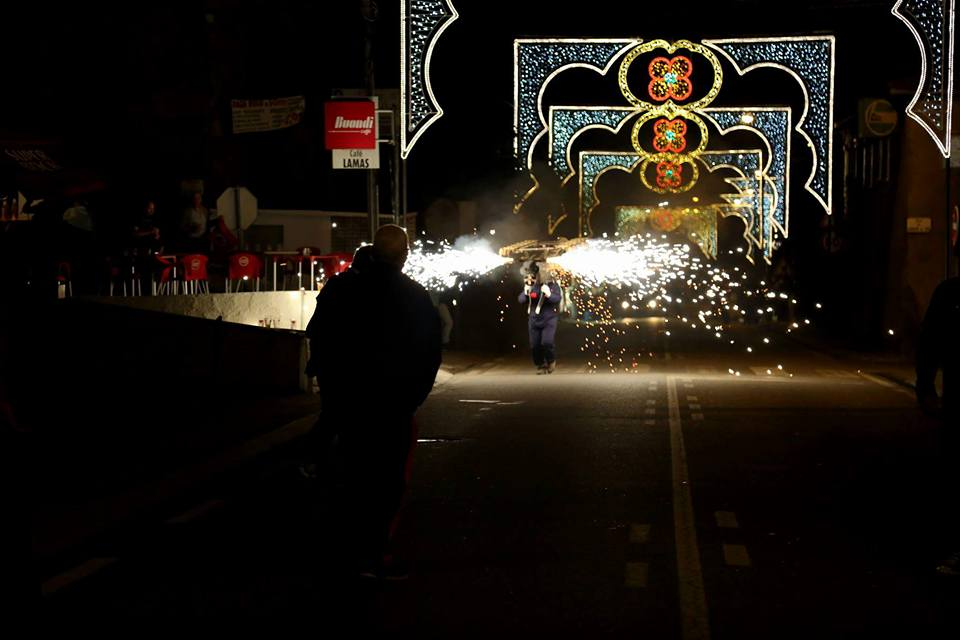 Vaca de Fogo